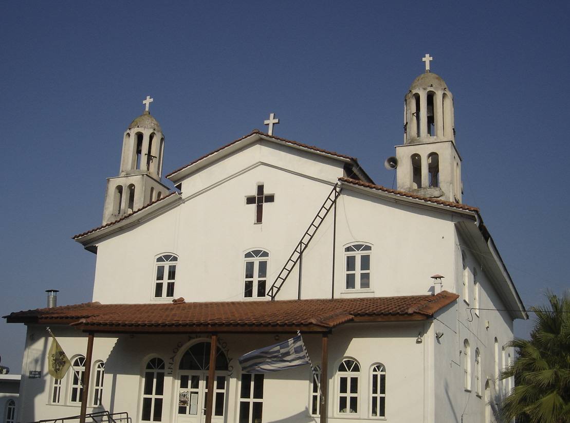 Α church at Sfendami.